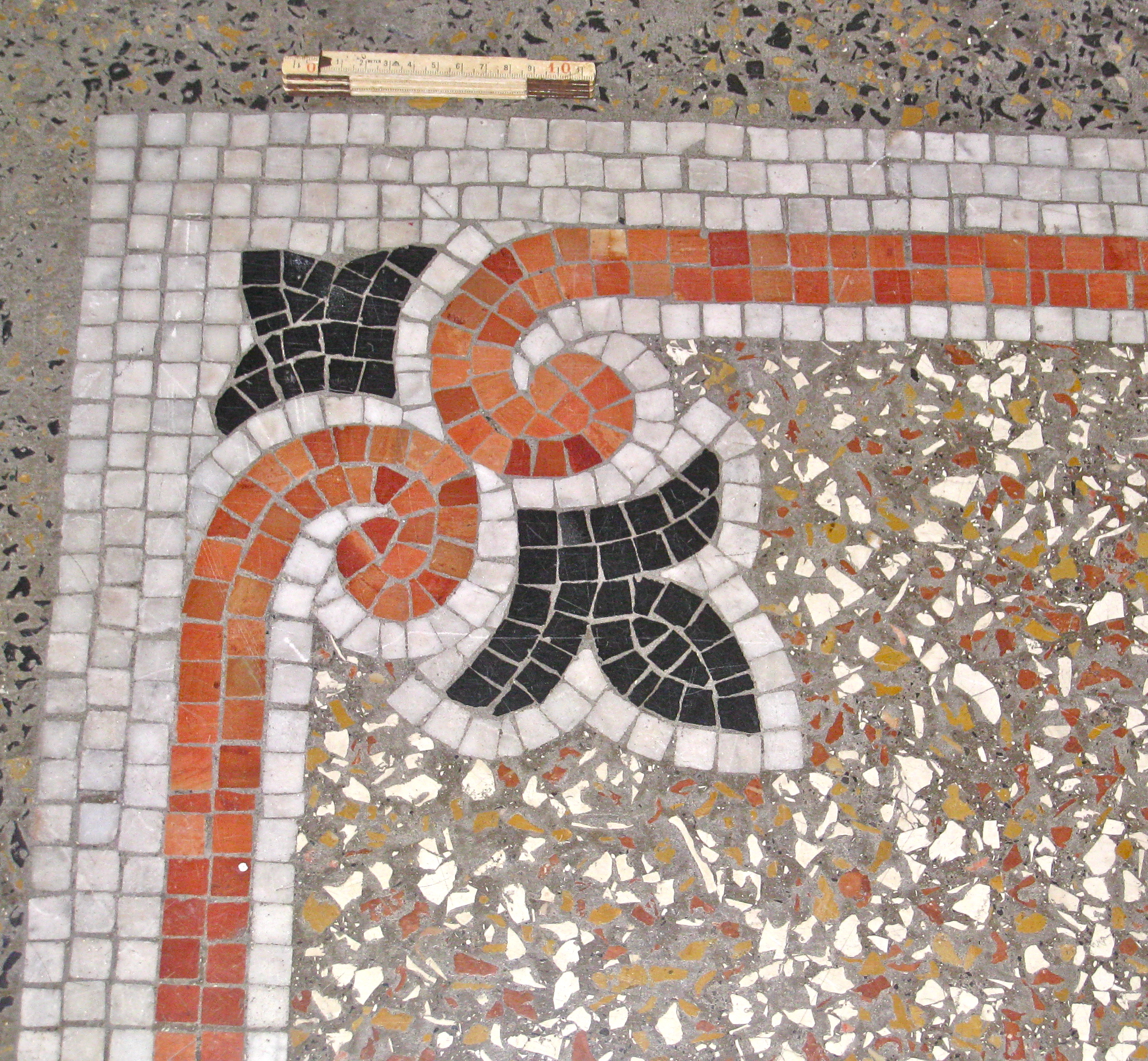 Boden im Treppenhaus Klosbachstrasse 150 8032 Zürich, erstellt vom Tessiner Baumeister Francesco Righini (1837-1914)